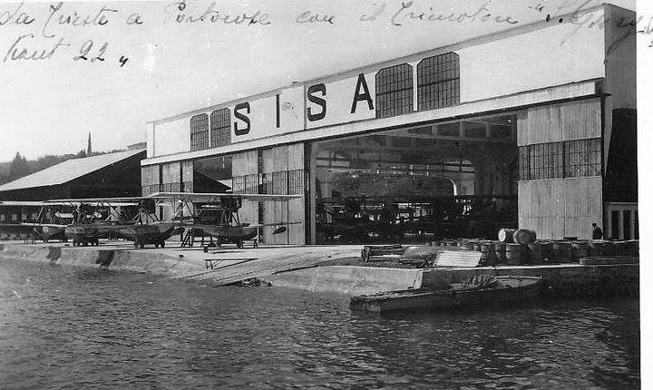 Hangar hidroavionov SISA v Portorožu